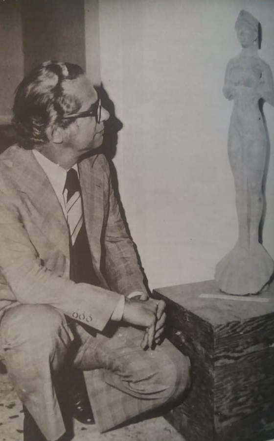 Gumercindo Rocha Dorea em Lagos.